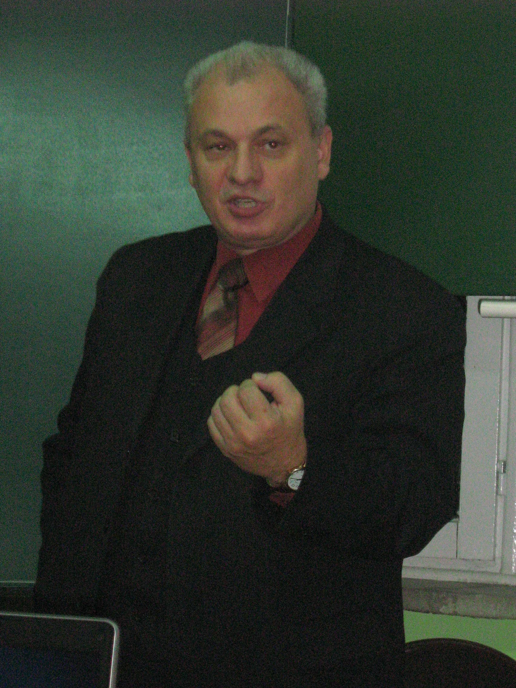 Paweł Czapkin - starosta kamieński